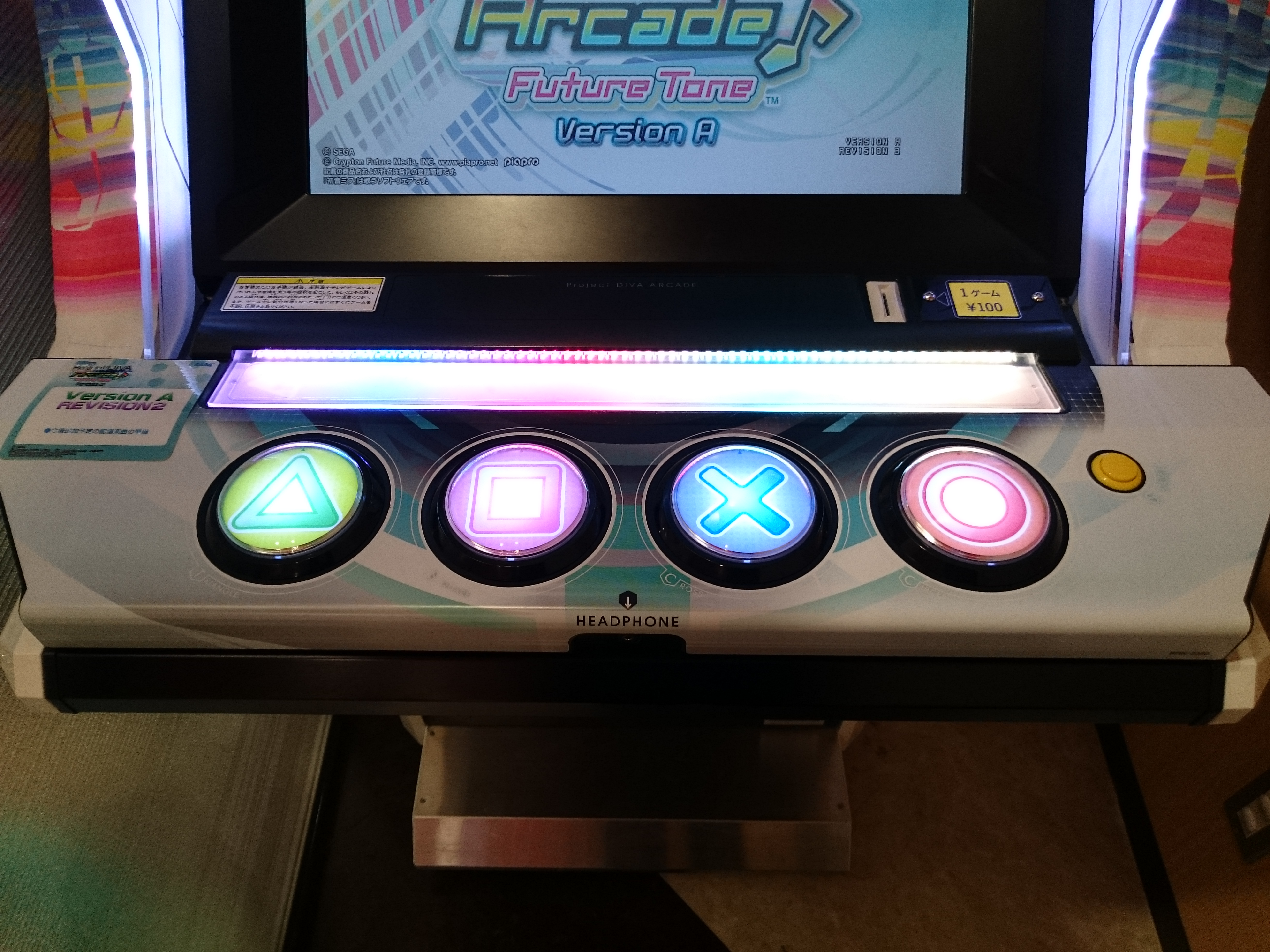 『初音ミク Project DIVA Arcade Future Tone Version A』筺体の操作盤。